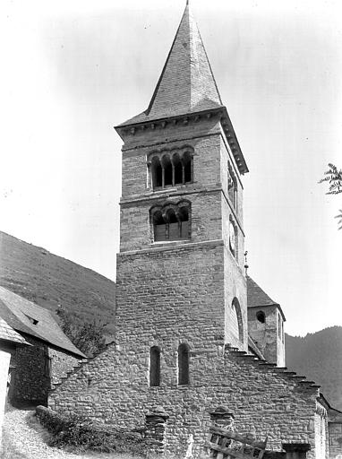 Clocher de l'église de Saint-Aventin par Eugène Lefèvre-Pontalis.